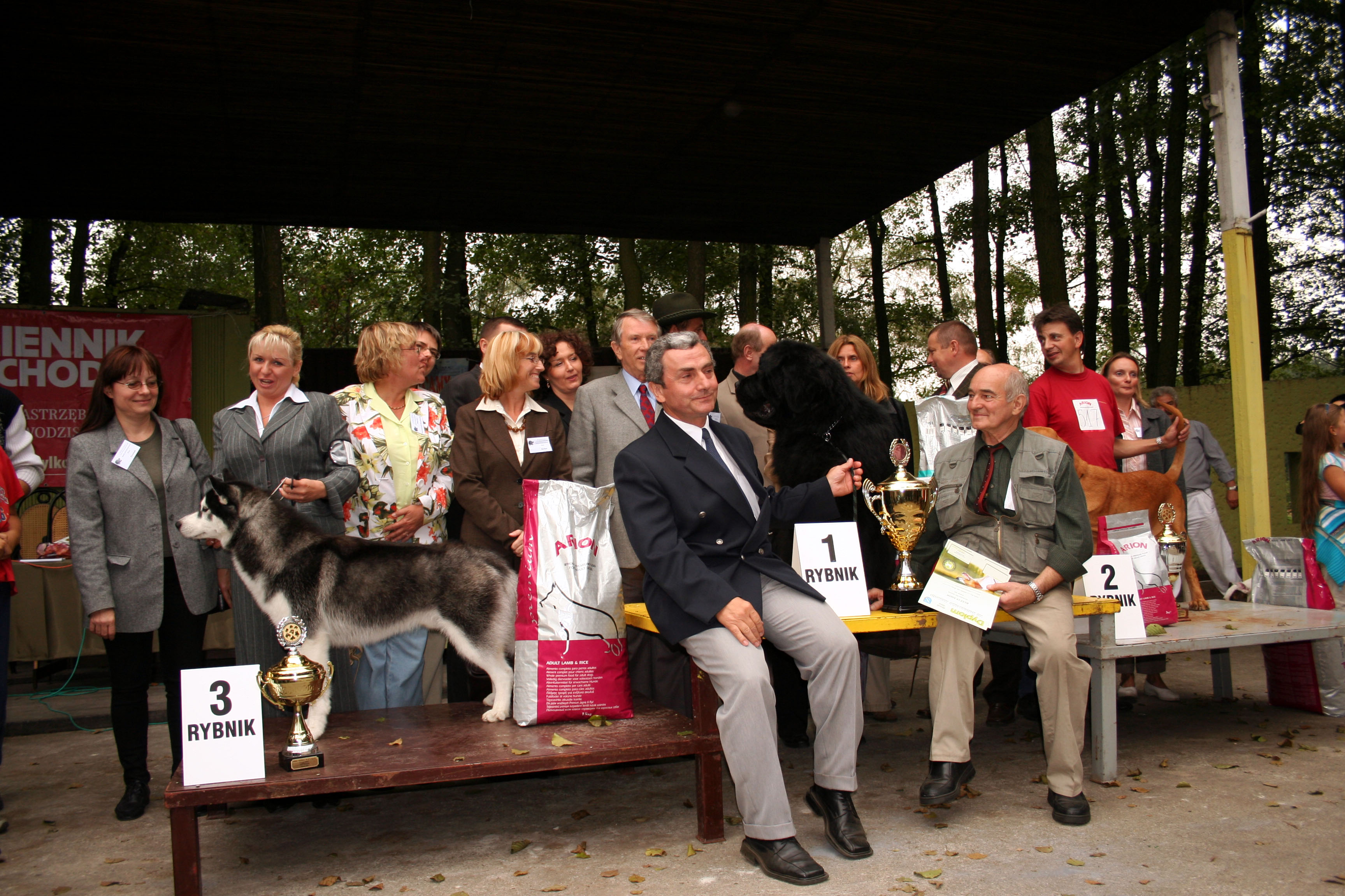 Celostátní výstava psů v Rybnice 2006, Polsko. Zde vítězové výstavy